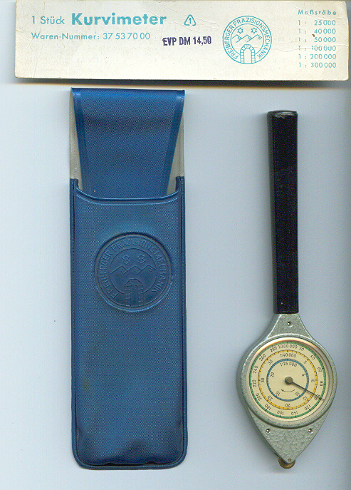 Summary Kurvimeter aus Freiberger Produktion. 60er-Jahre. Selbst eingescannt (Michael Sander).